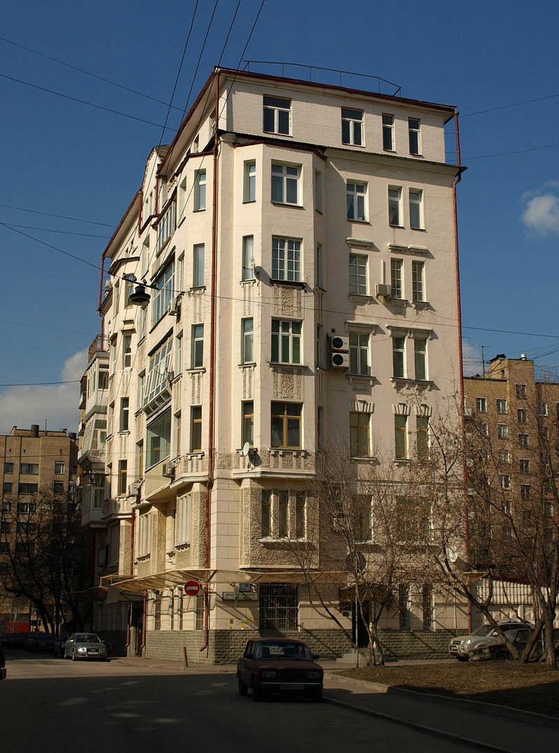 1st Truzhenikov Lane, Moscow